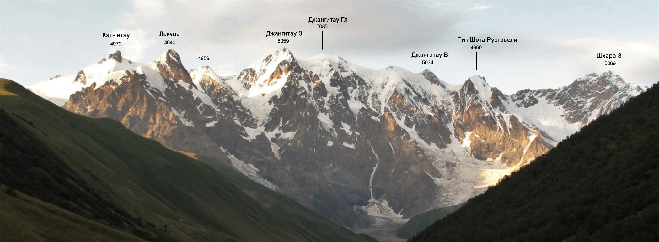 Главний Кавкаыский хребет между вершинами Катын-Тау и Шхара. Названия вершин для Наумов (1985) Горы Сванетии. Высоты для